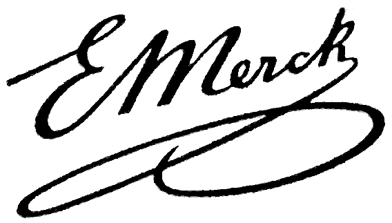 Heinrich Emanuel Merck (* 15. September 1794 Darmstadt; † 14. Februar 1855 Darmstadt), Unterschrift. Das charakteristische Signum seines Neffen Emanuel August Merck fand sich in der Zeit nach 1945 auf vielen Merck-Verkaufsprodukten, 1995 auch auf Merck-Aktien. Verwendet bis 2010 im Zusammenhang mit geschützten Marken (z.B. [1])